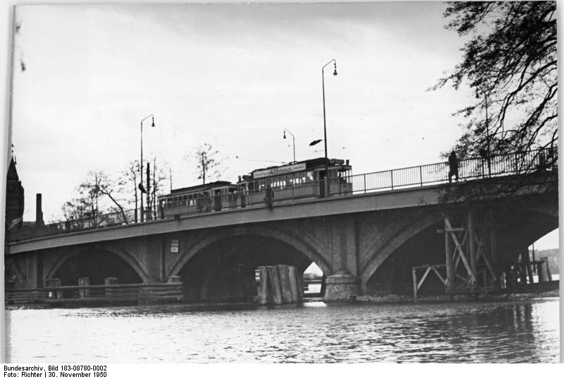 Berlin, Köpenick, Dammbrücke, Straßenbahn Illus Richter 30.11.50 Zwei Jahre demokratischer Magistrat von Gross-Berlin. UBz: Die wiederaufgebaute Dammbrücke in Köpenick, die am 30.11.50 ihrer Bestimmung übergeben wurde.